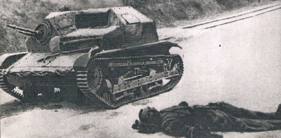 Ranny czołgista polski. [opis oryginalny]. Uwaga: Po lewej stronie widać polską tankietkę TKS.